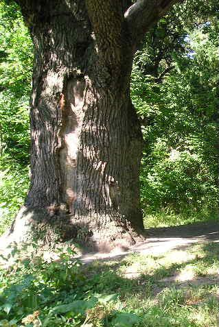 Дуб у Шарівці: Старовинний дуб у садово-парковому комплексі смт Шарівка